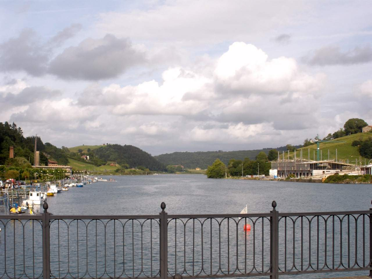 Orio (Gipuzkoa)